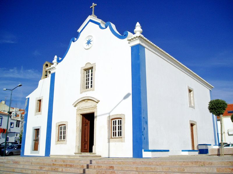 Igreja na Ericeira